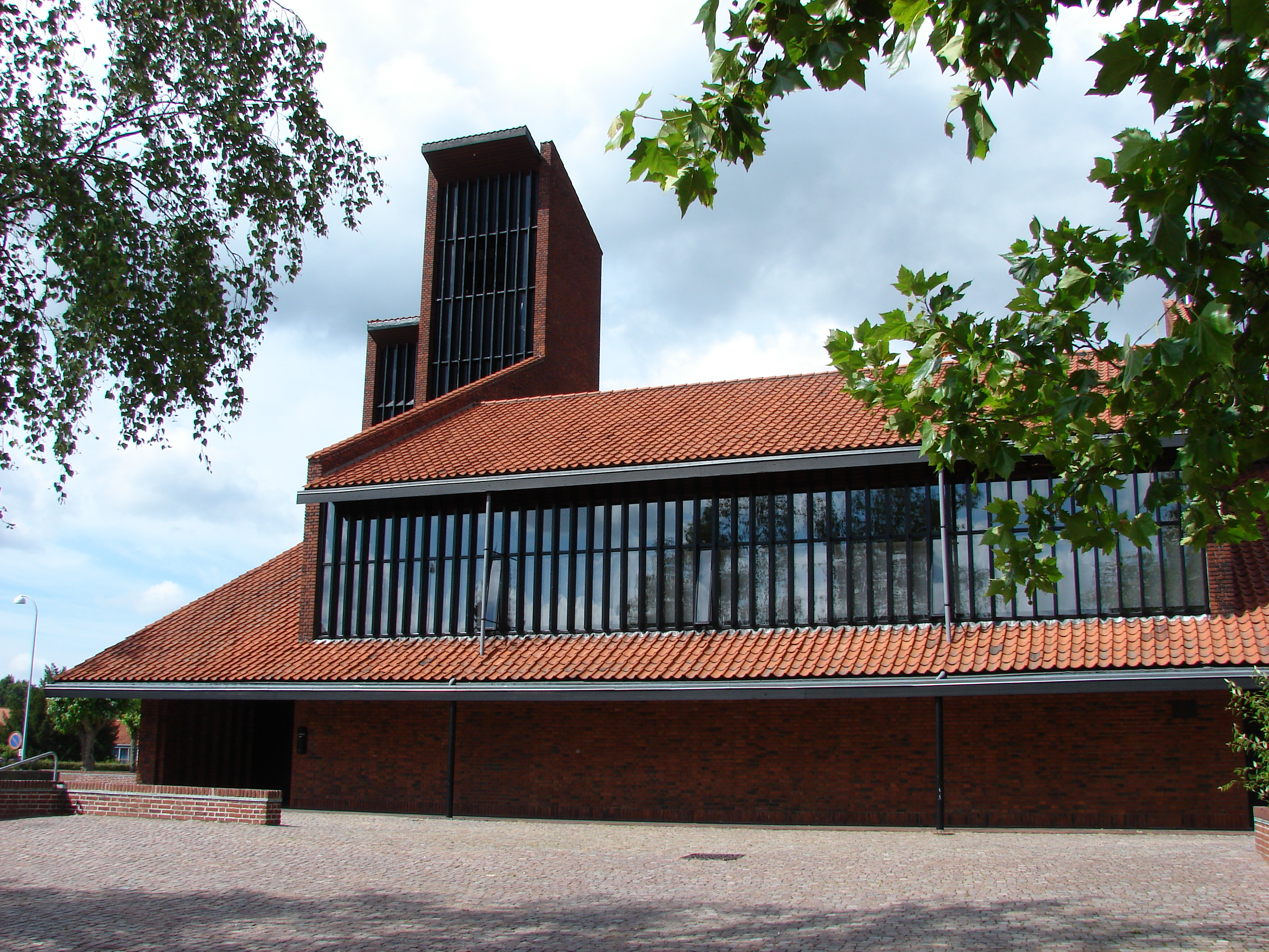 Stengård Kirke. Kirkeskibet samt kirketårnet